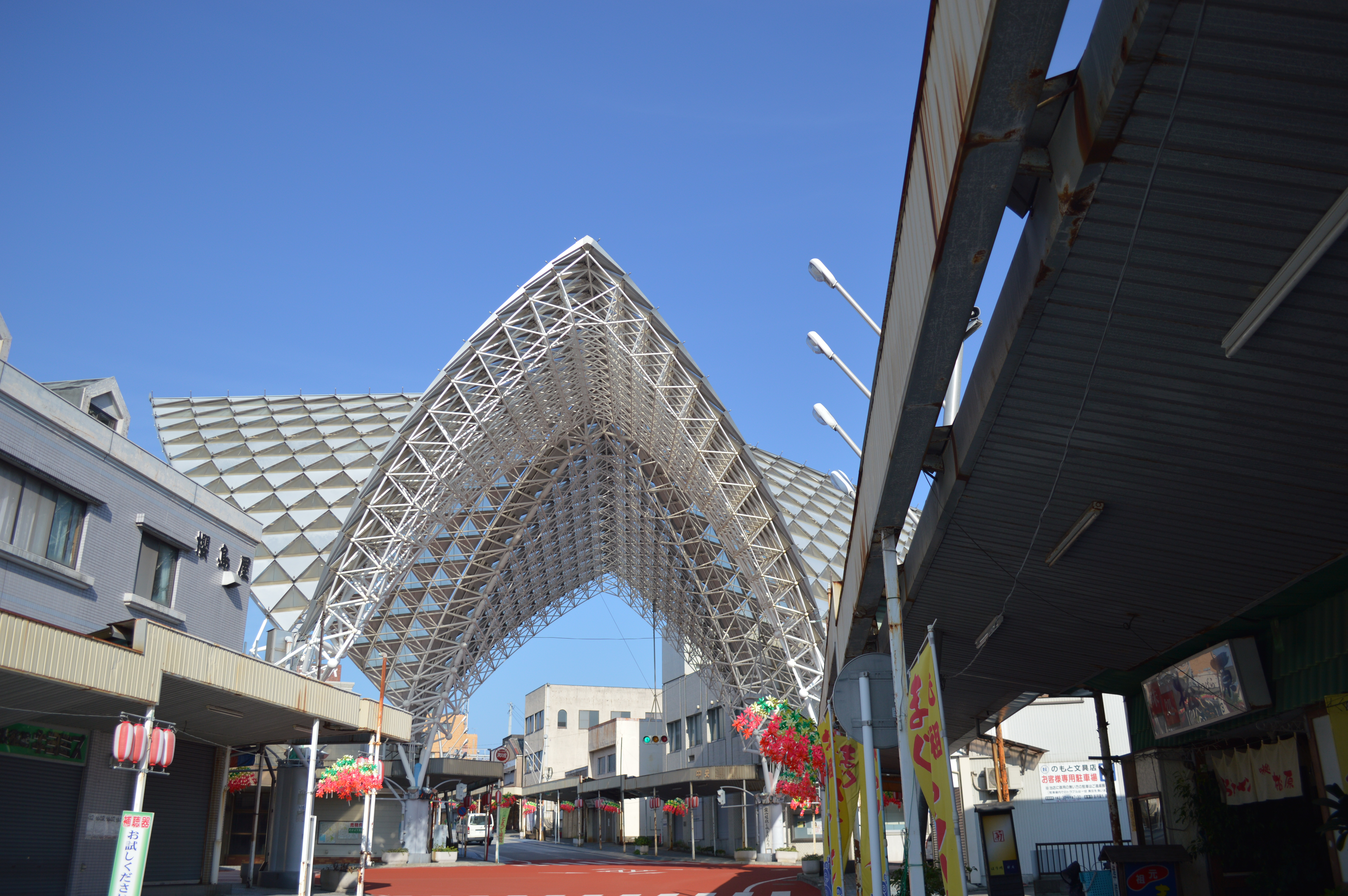 いちき串木野市の中心部の商店街にある屋根（モニュメント）